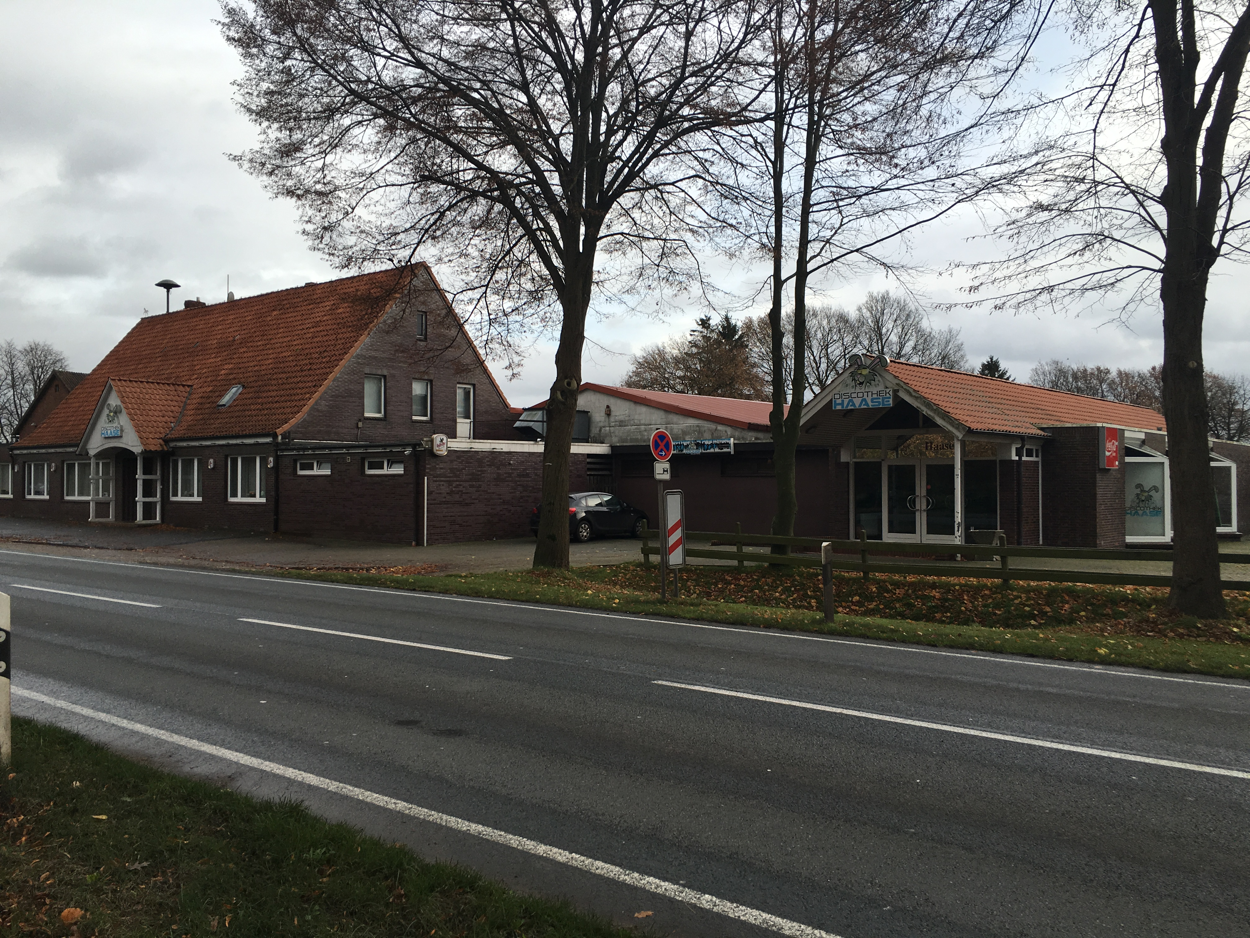 Diskothek Haas in Glinn